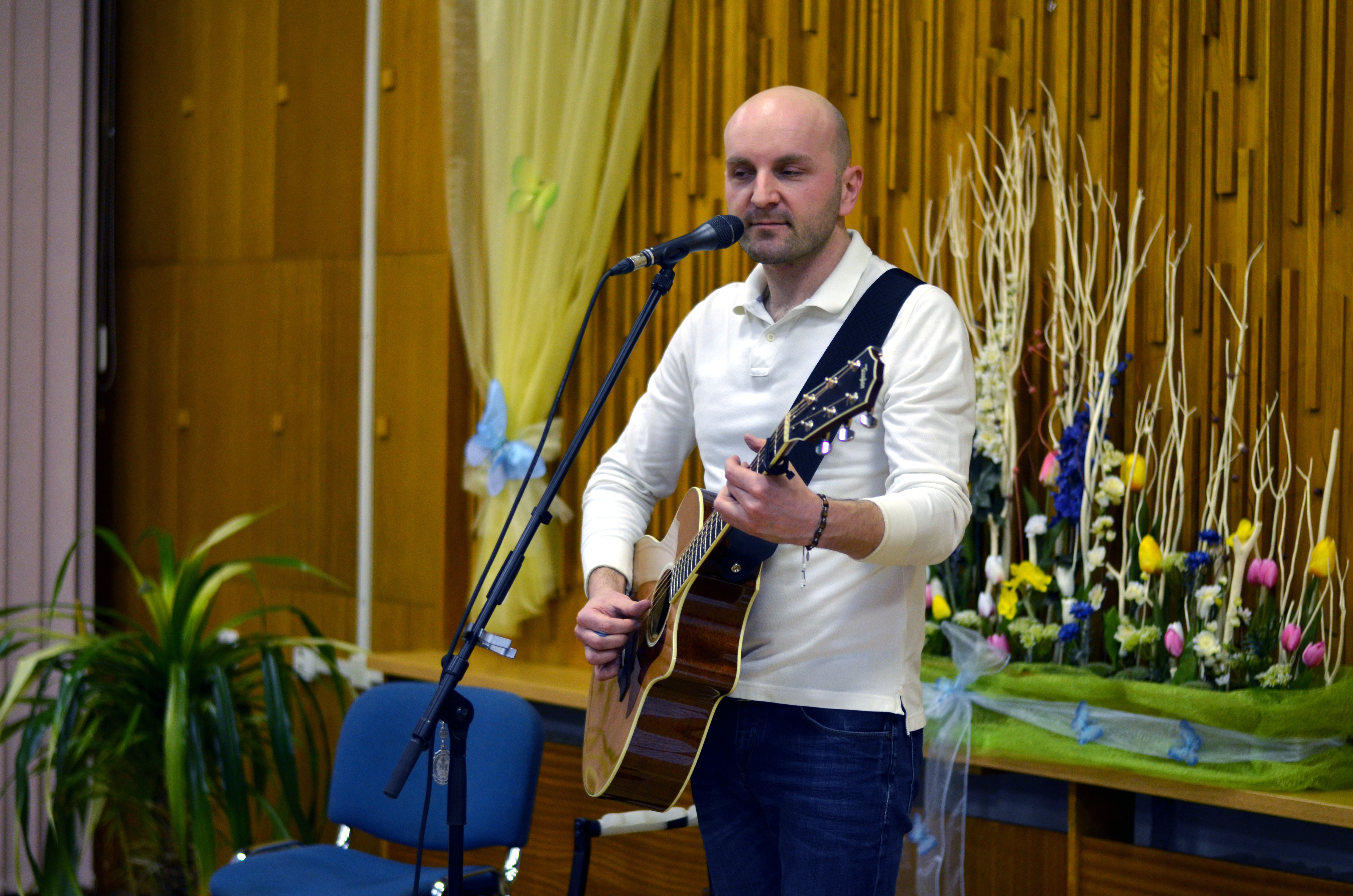 Koncert Pavla Helana v Adamově